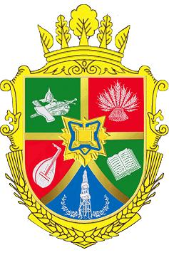 Герб Красноградського району Харкіівської області України